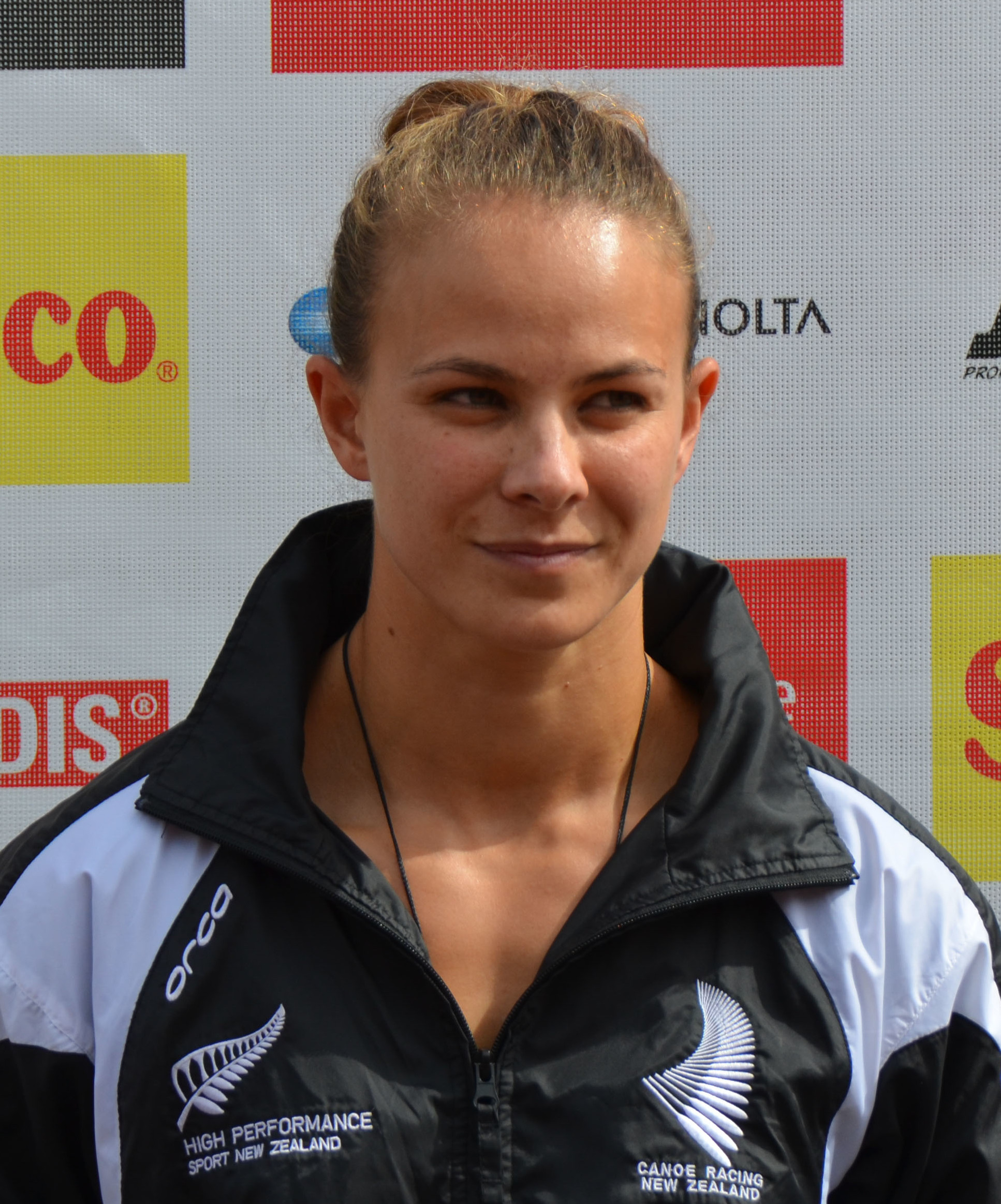 2013 ICF Canoe Sprint World Championships in Duisburg - Alle Ergebnisse/Teilnehmer unter: Gewinner:NZL - NEW ZEALAND CARRINGTON, Lisa POL - POLAND WALCZYKIEWICZ, Marta SLO - SLOVENIA PONOMARENKO JANIC, Spela